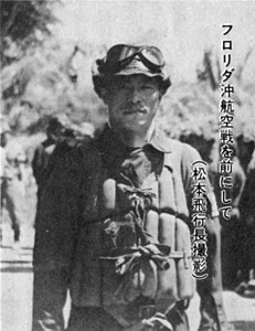 ブイン基地での高橋定。「瑞鶴」飛行長・松本正平中佐撮影。